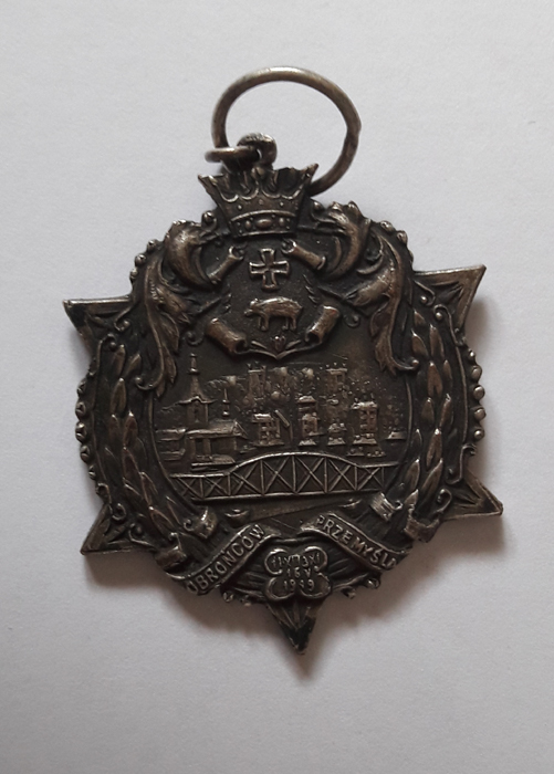 Gwiazda Przemyśla